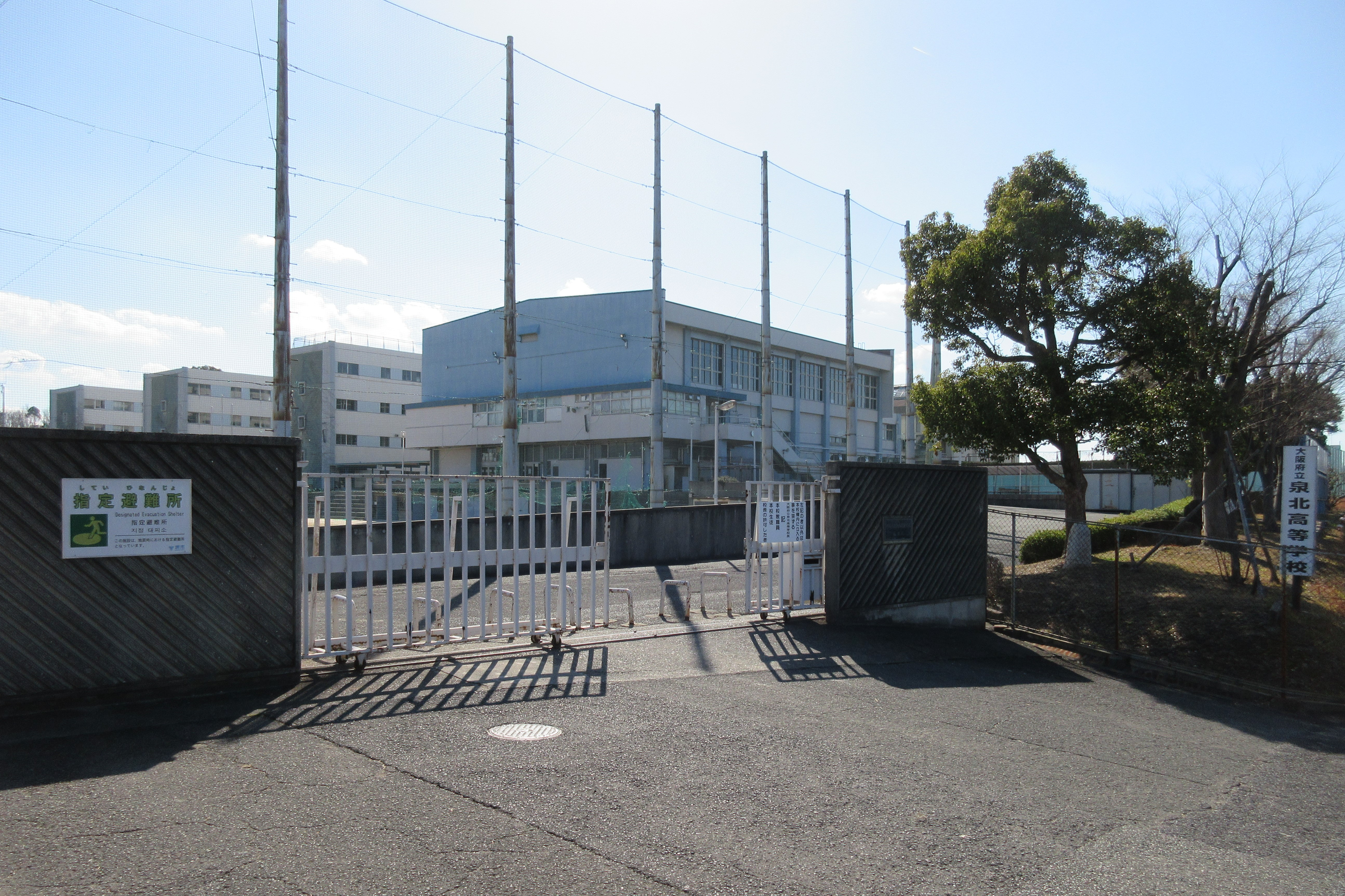 大阪府立泉北高等学校